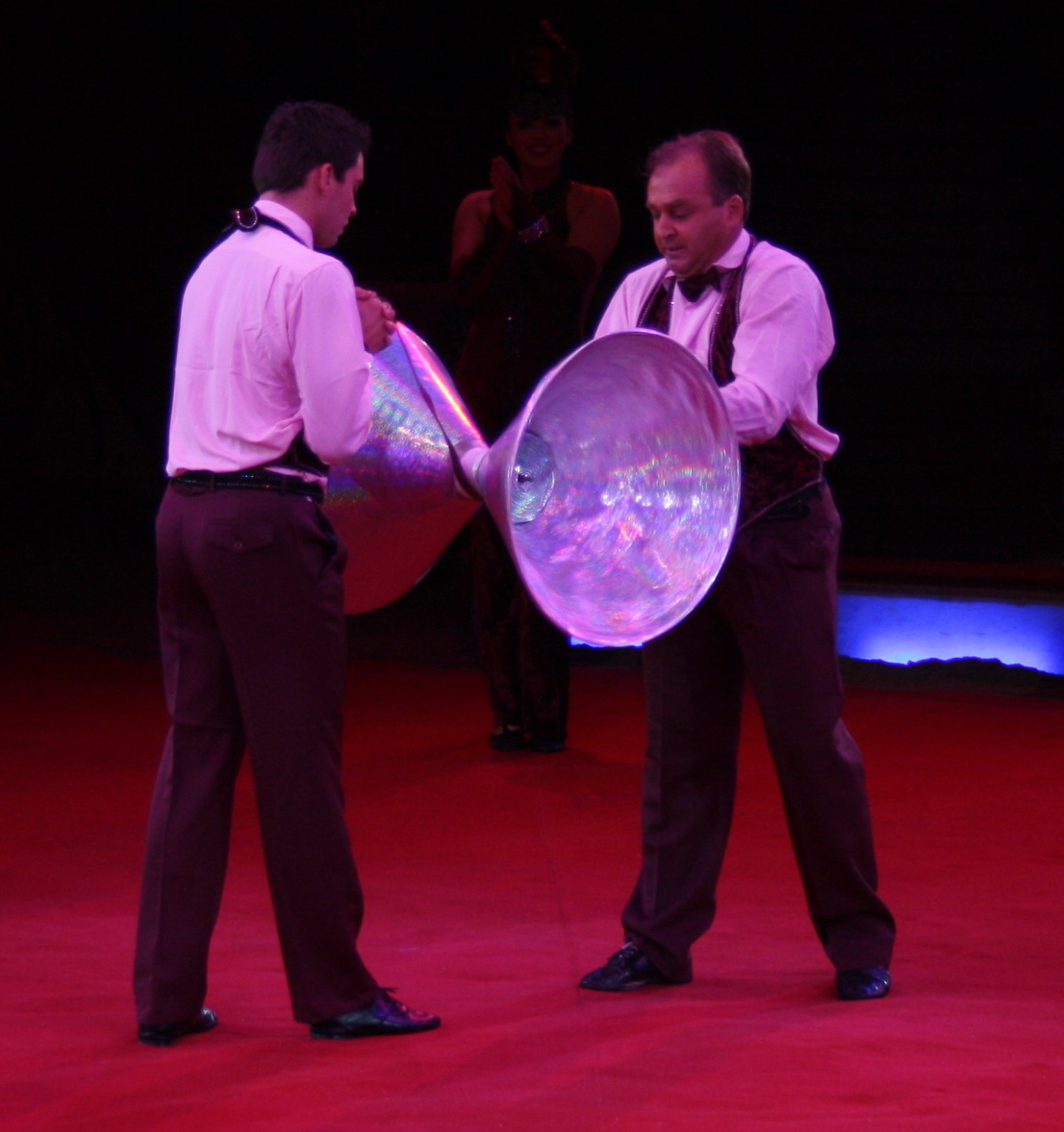 ANASTASINI FAMILY mit Diabolos aus USA